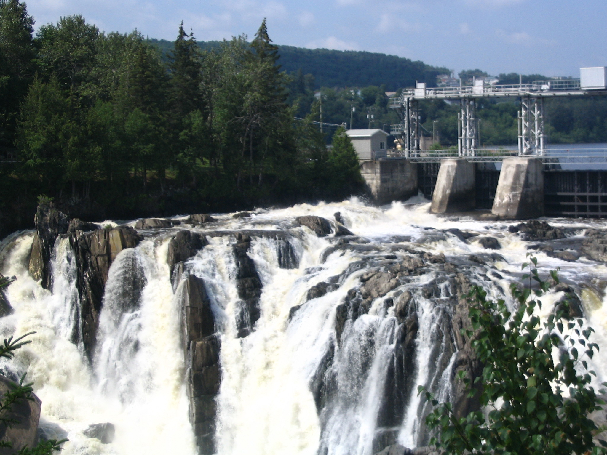 Centrale hydroélectrique de Grand-Sault, au Nouveua-Brunswick.